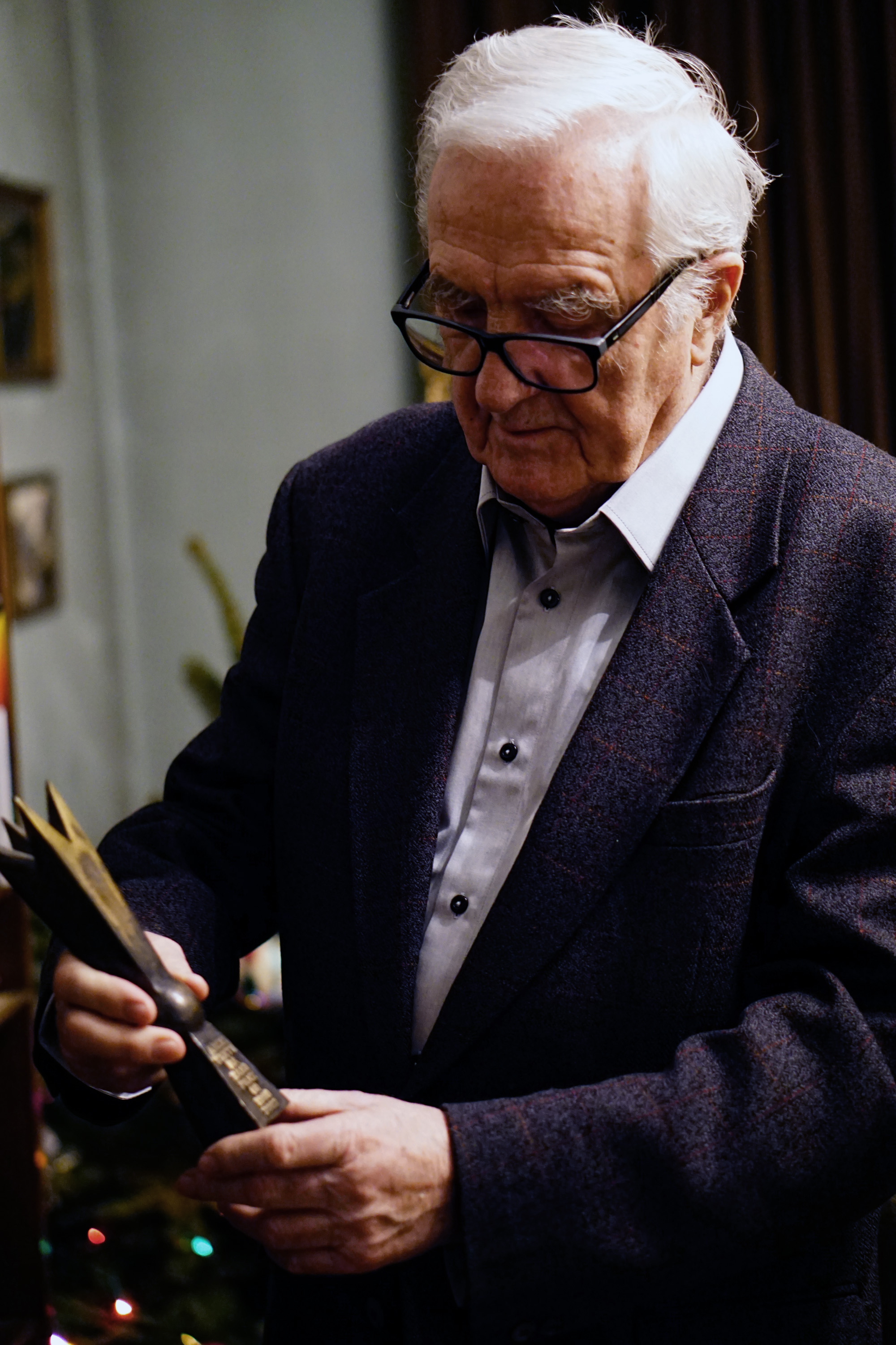 Wojciech Buliński, rok 2018